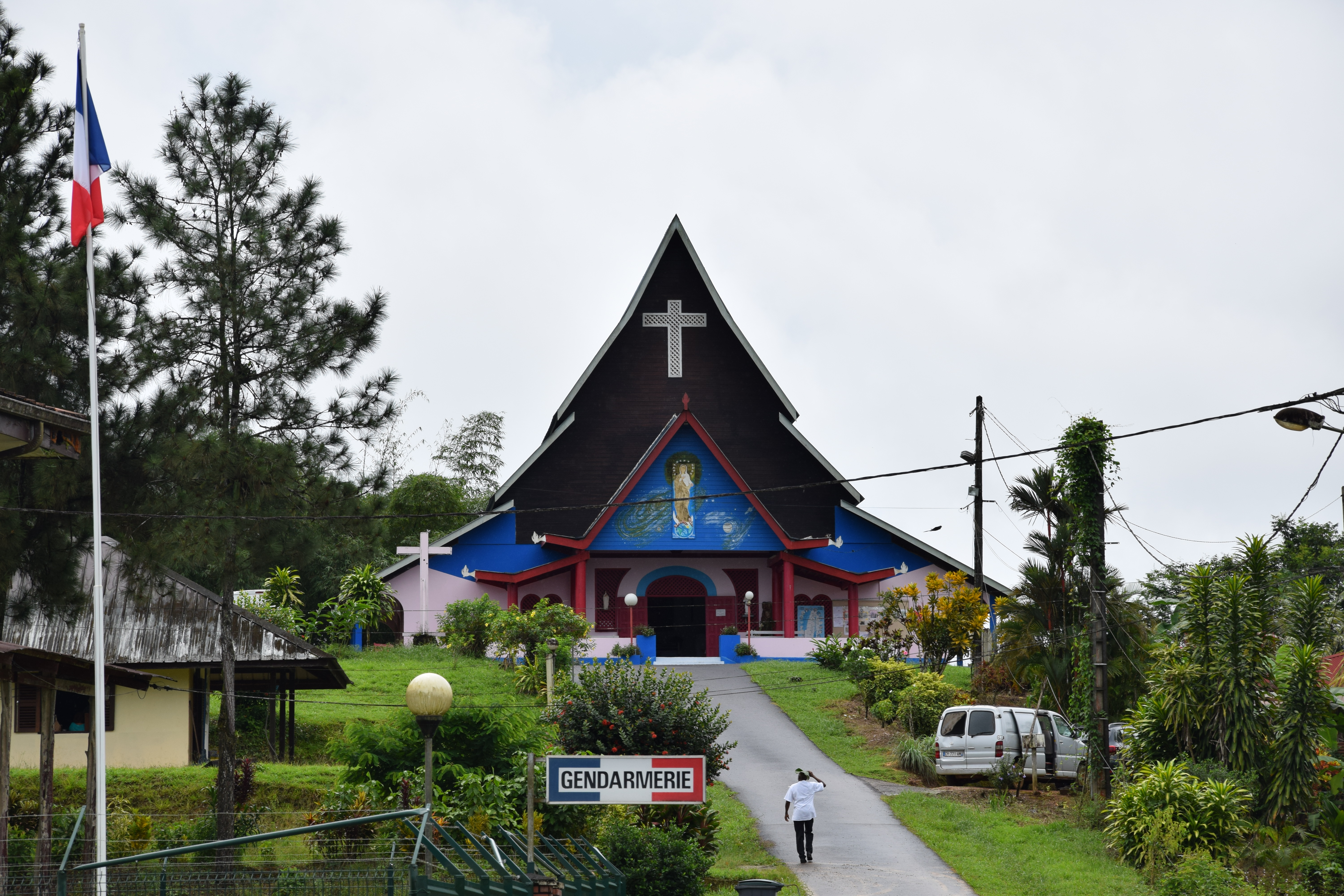 Cacao, French Guiana